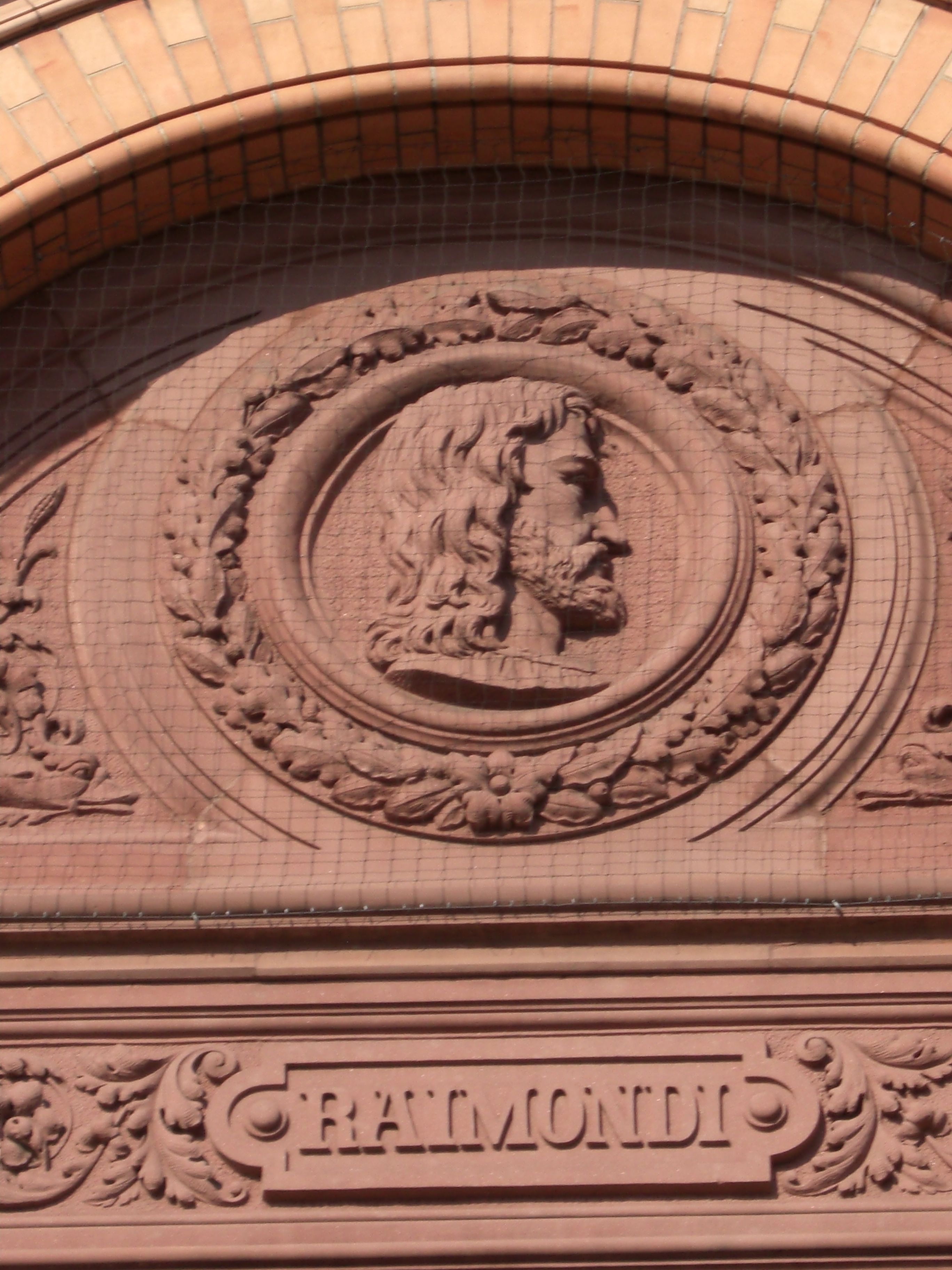 Medaillon von Marcantonio Raimondi (etwa 1475-1534), Kupferstecher; This is a photograph of an architectural monument.